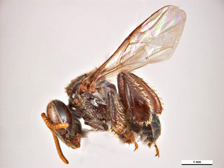 Tetragonula sapiens female worker